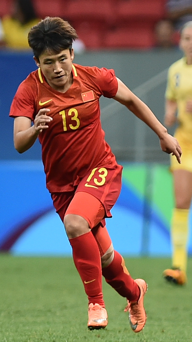 Estádio Nacional de Brasília Mané Garrincha, Brasília, DF, Brasil, 9/8/2016 Foto: Andre Borges/Agência Brasília China e Suécia jogam nesta terça-feira (9), no Estádio Mané Garrincha, pelo grupo E do futebol feminino nas Olimpíadas 2016.